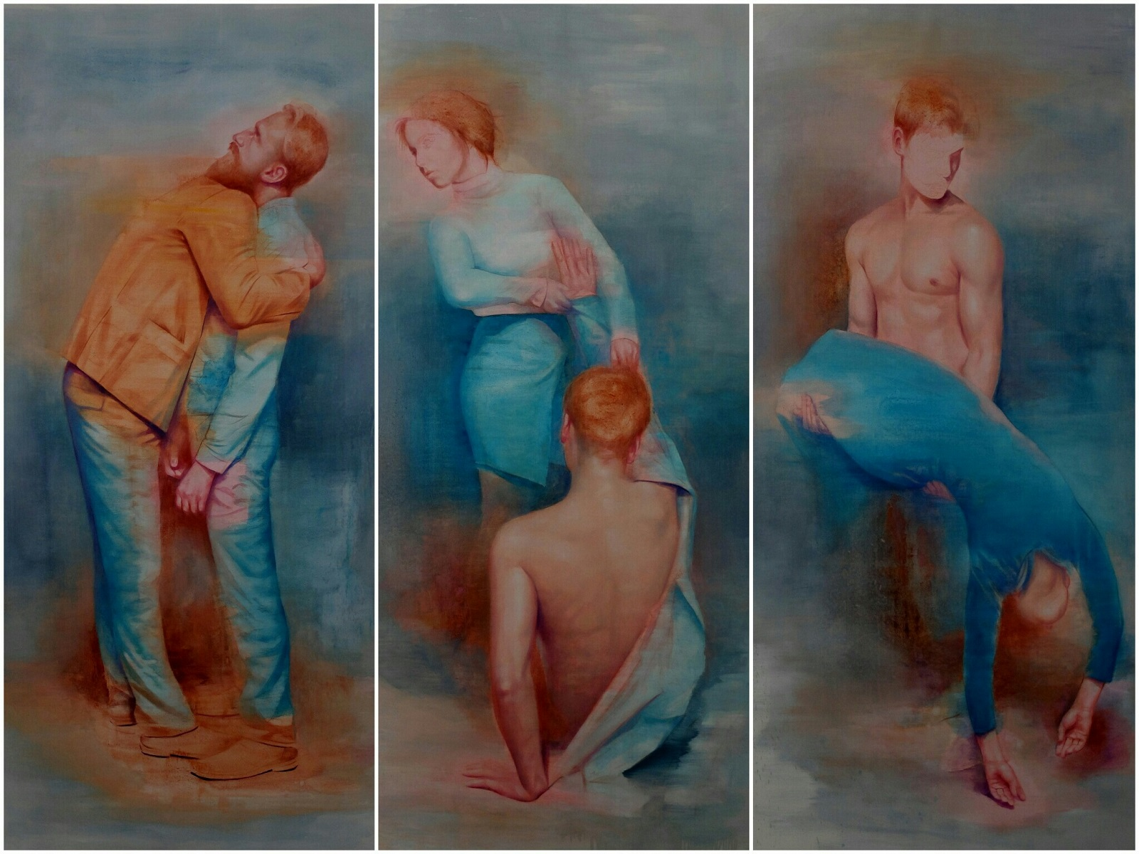 Sylwester Stabryła, Raj Utracony, tryptyk, 3x200x100, olej na płótnie, 2018r